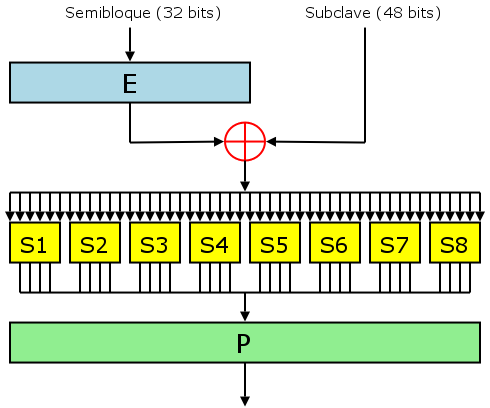 DES - Función F Modificada de es::en:Image:DES-f-function.png